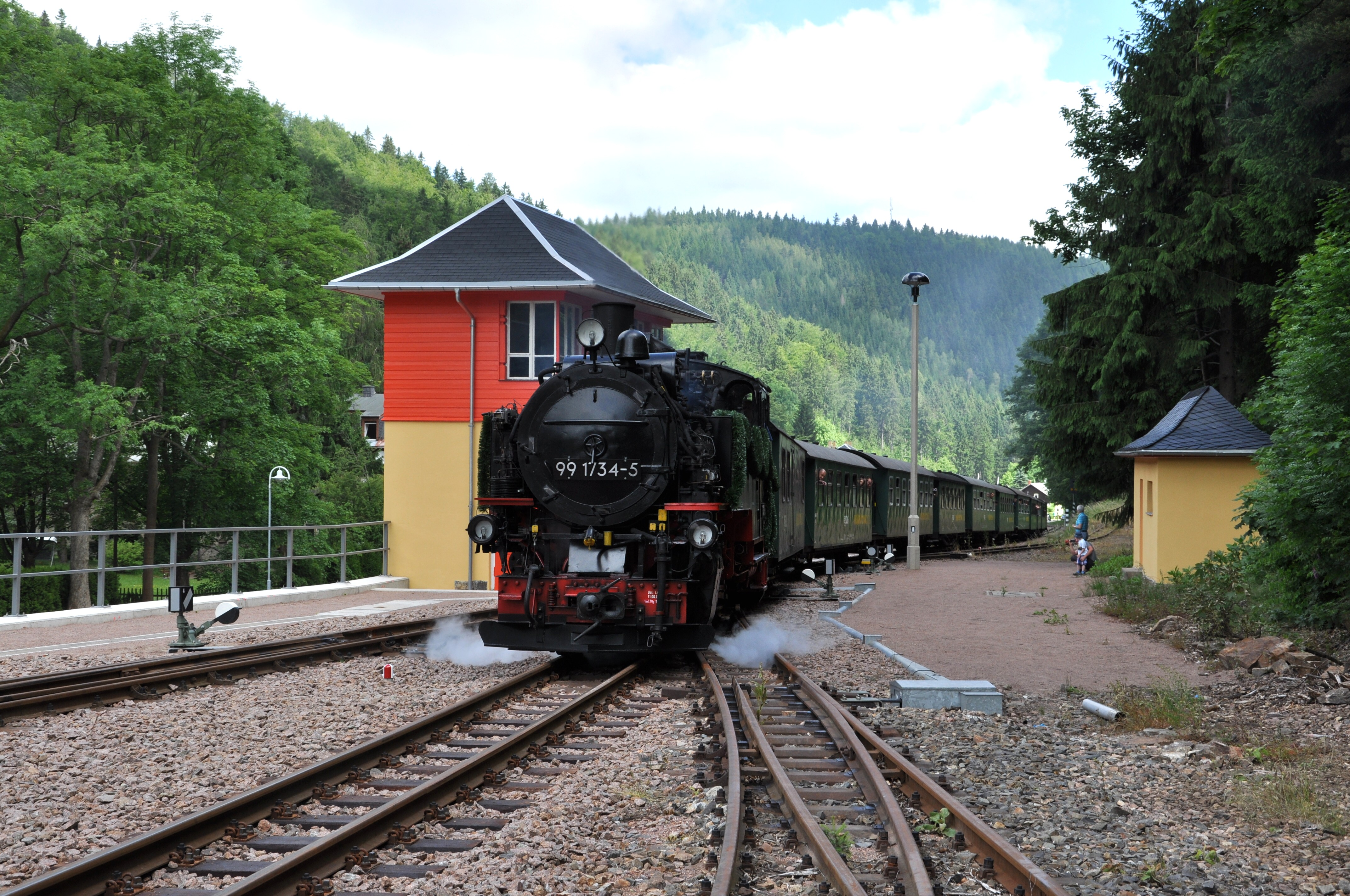 Einfahrender Reisezug im Bahnhof Kurort Kipsdorf.